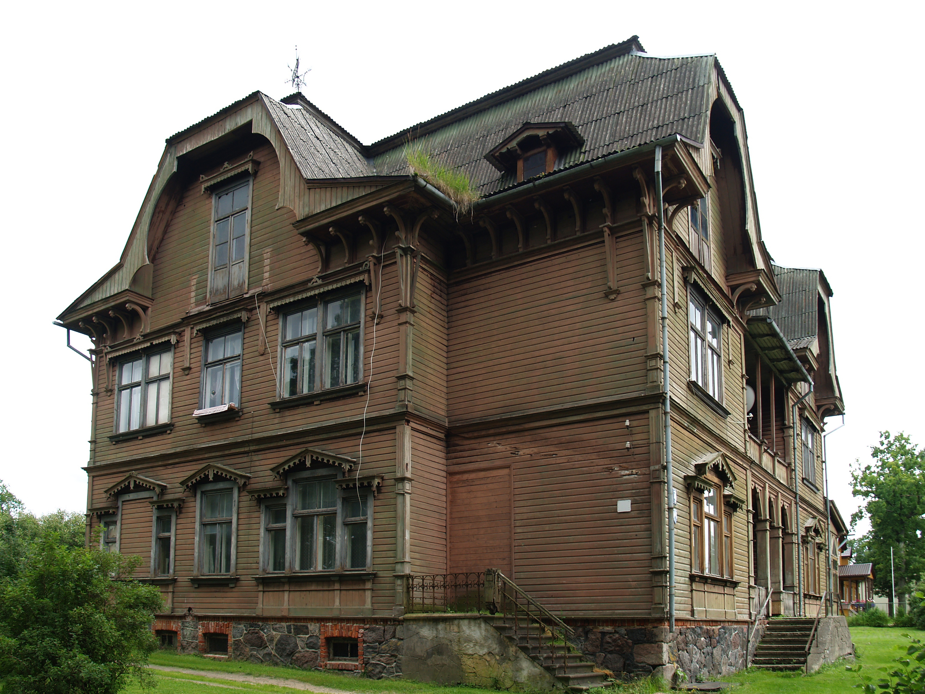 Heinaste mõisa elamu.